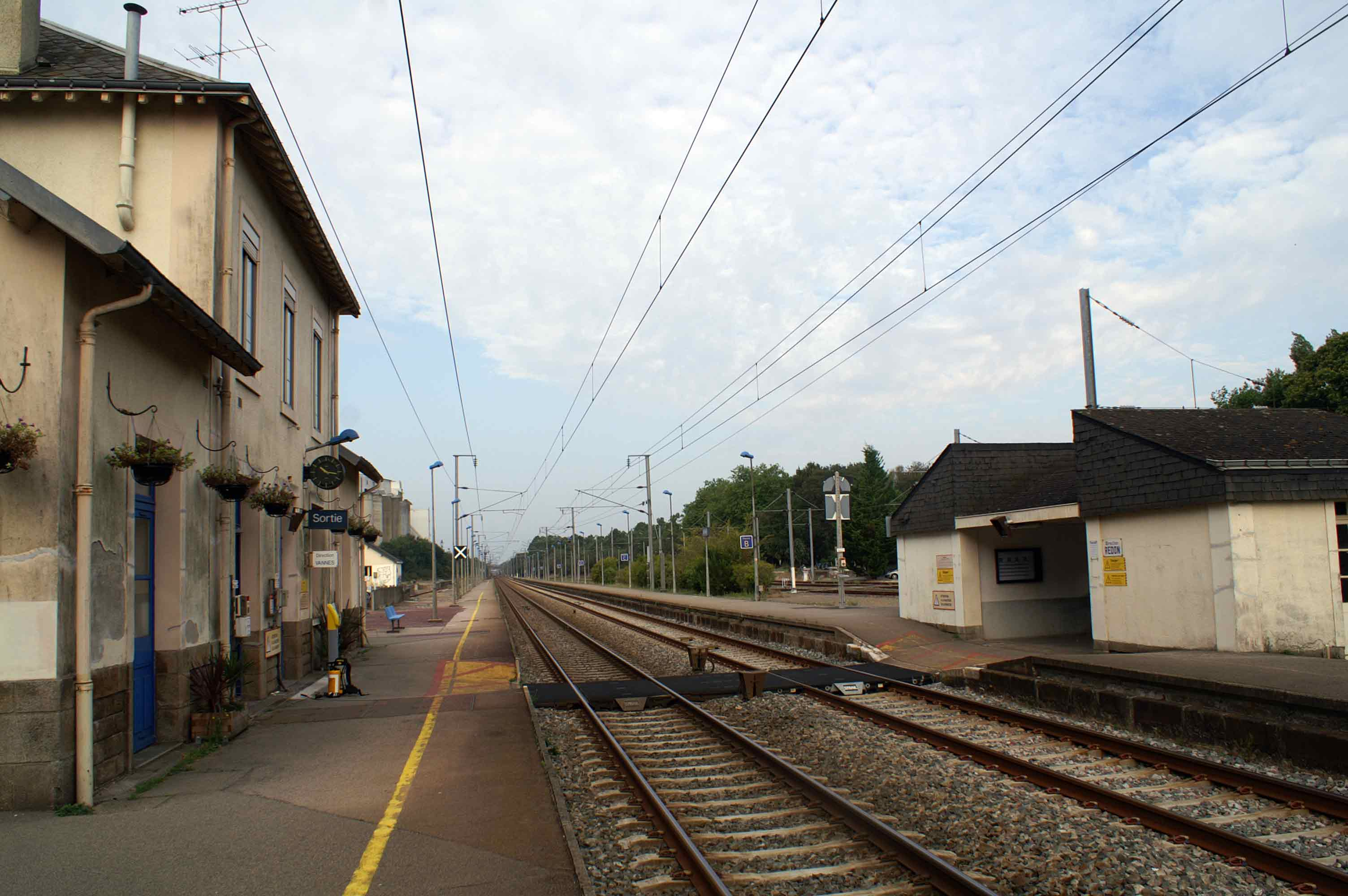 Gare de Questembert, côté voies.